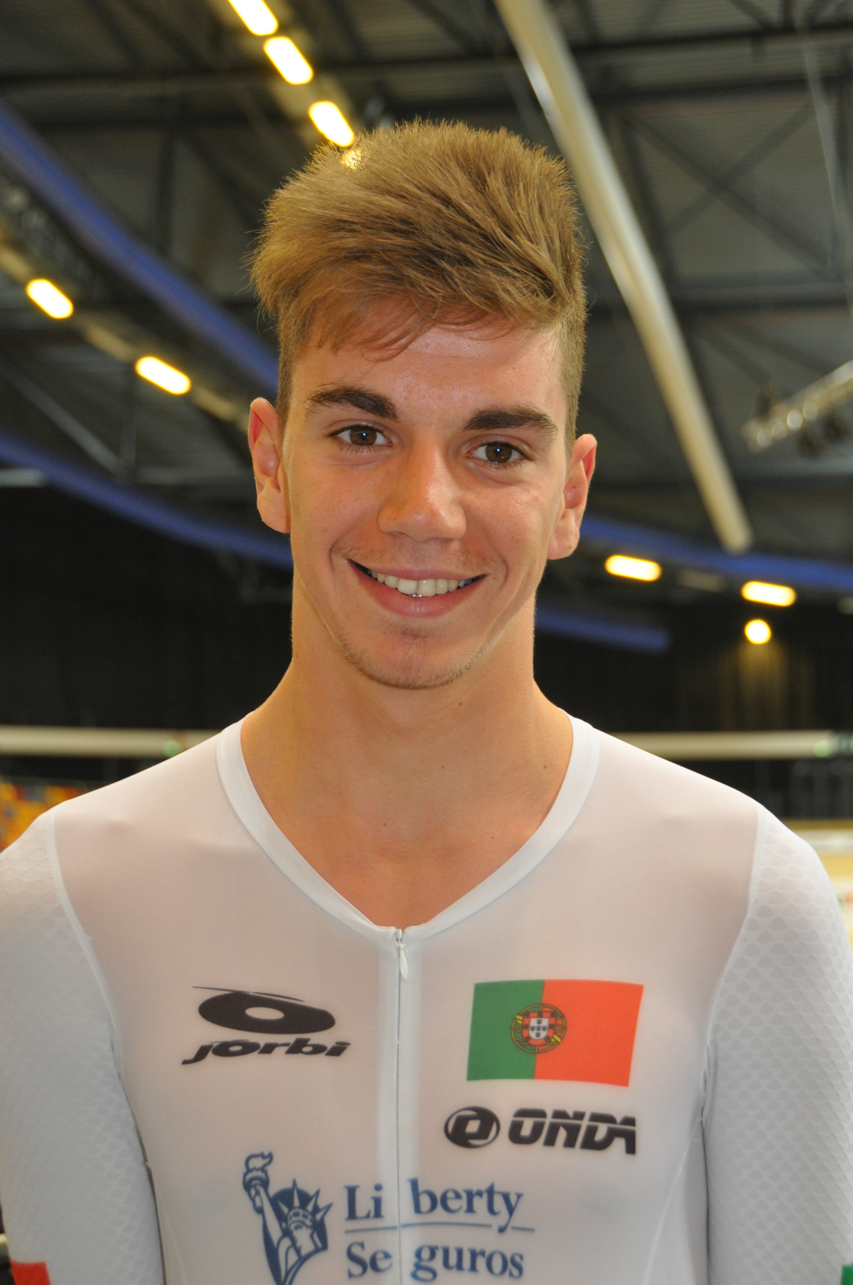 Ivo Oliveira, portugiesischer Radsportler